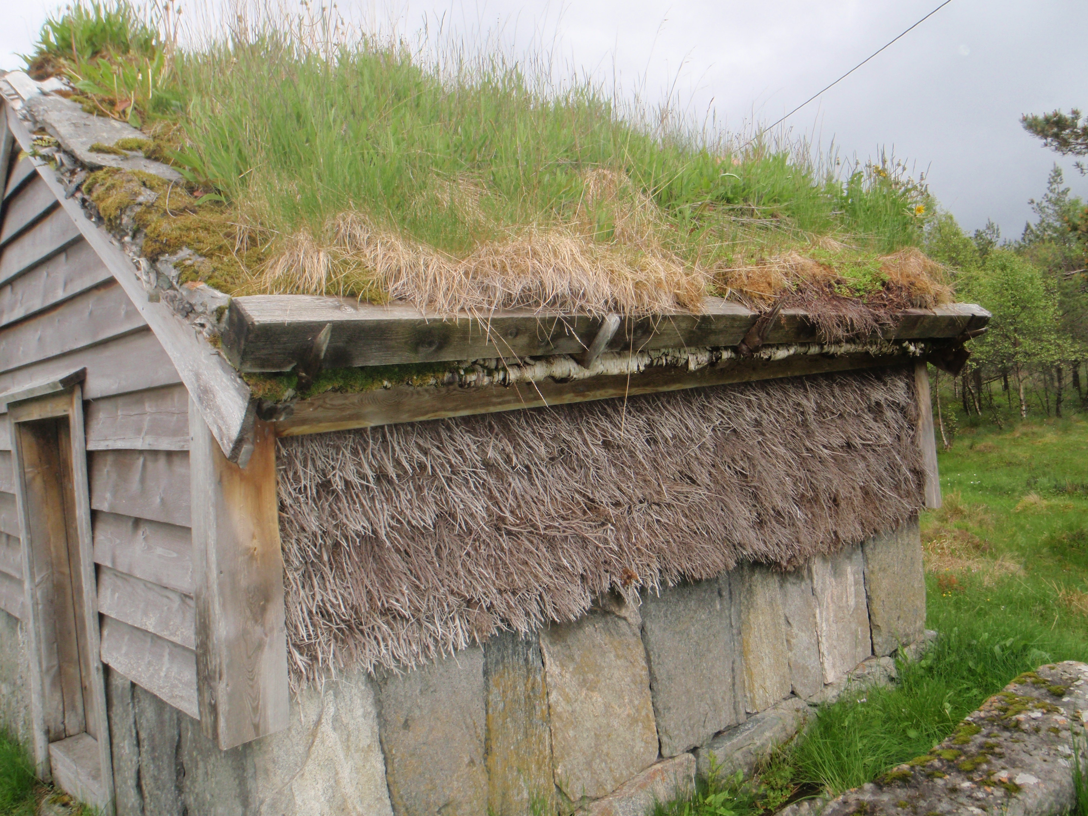 Torvløe som er gjenoppbygd på Hordamuseets avd. Fanastøl Den er steinsatt nederst, med en halv langvegg av brakje, og tradisjonelt torvtak